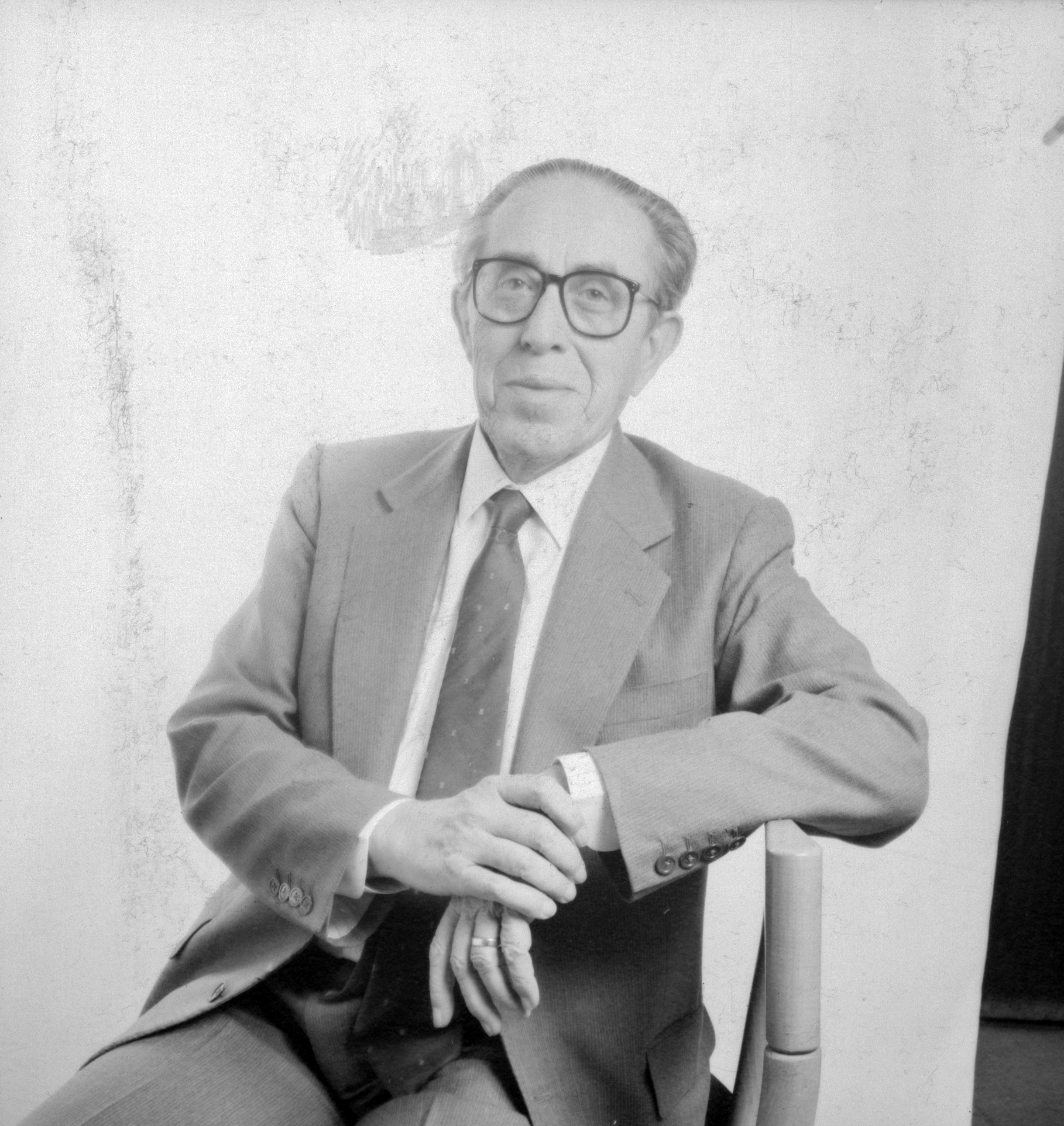 Josep Maria Vilaseca